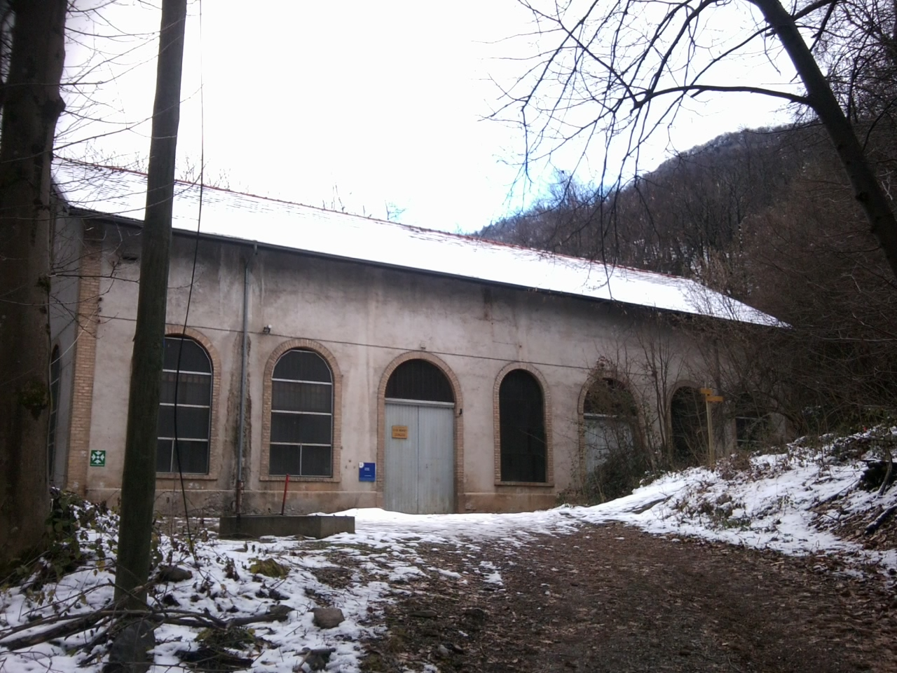 Saint-Pierre-de-Mésage (38) : La centrale EDF de Loula.